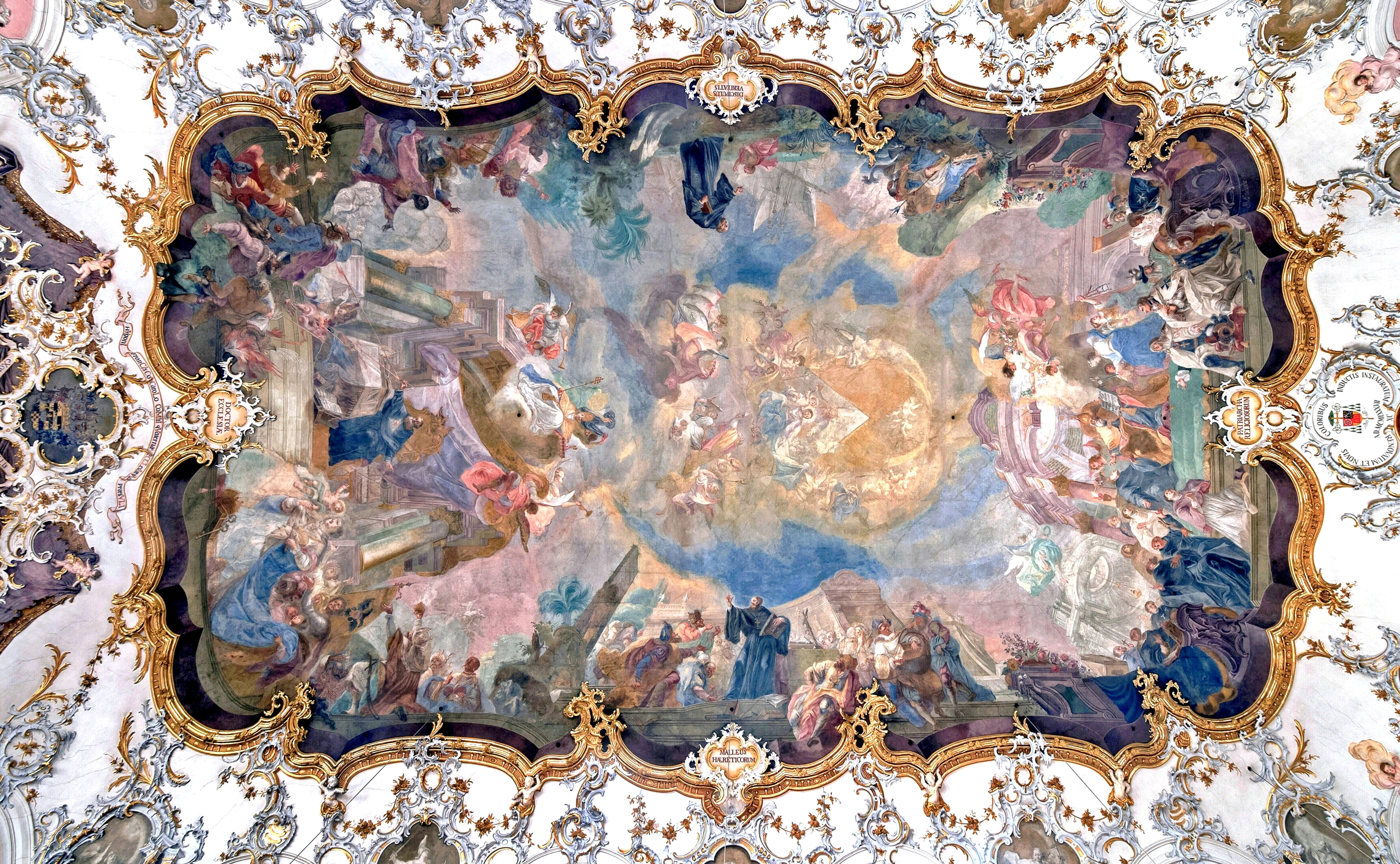 Augustinerkiche Mainz, Deckengemälde mit Szenen aus dem Leben des Ordensheiligen Augustinus